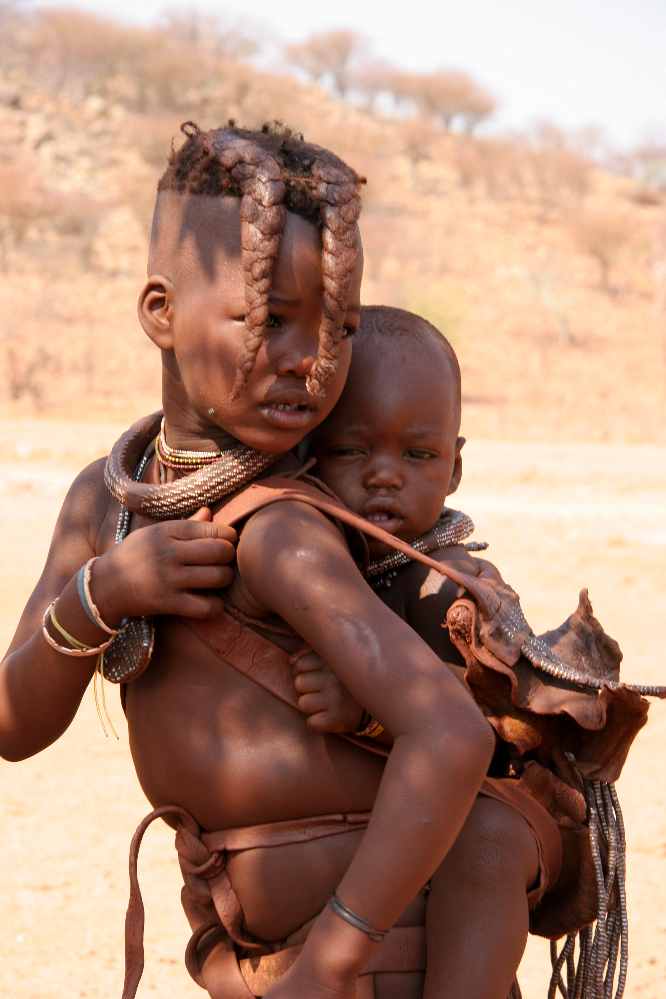 namibie, fillette himba portant son petit frère